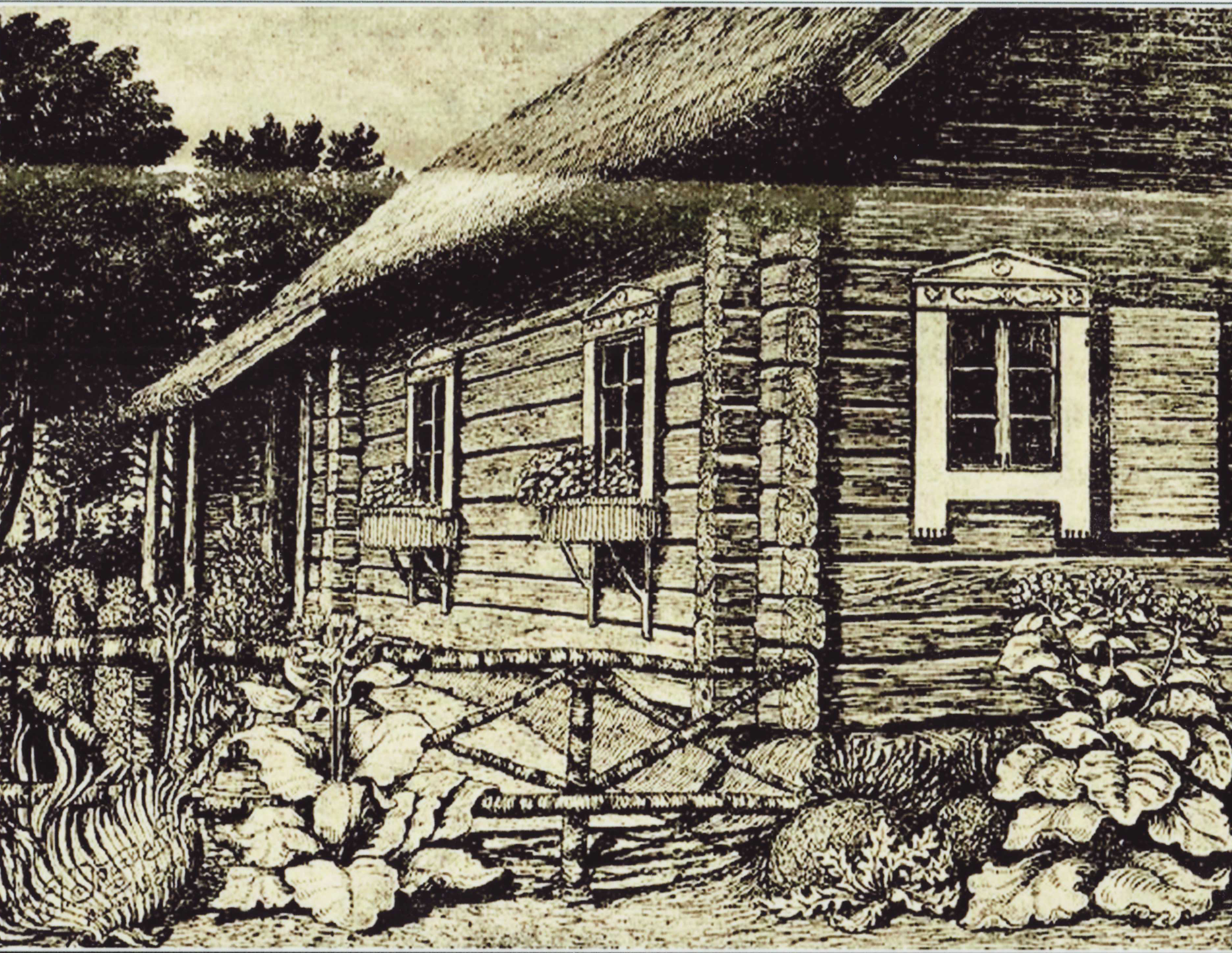 Бацькоўская хата кс. Адама Станкевіча ў в. Арляняты. Друкарскі адбітак.